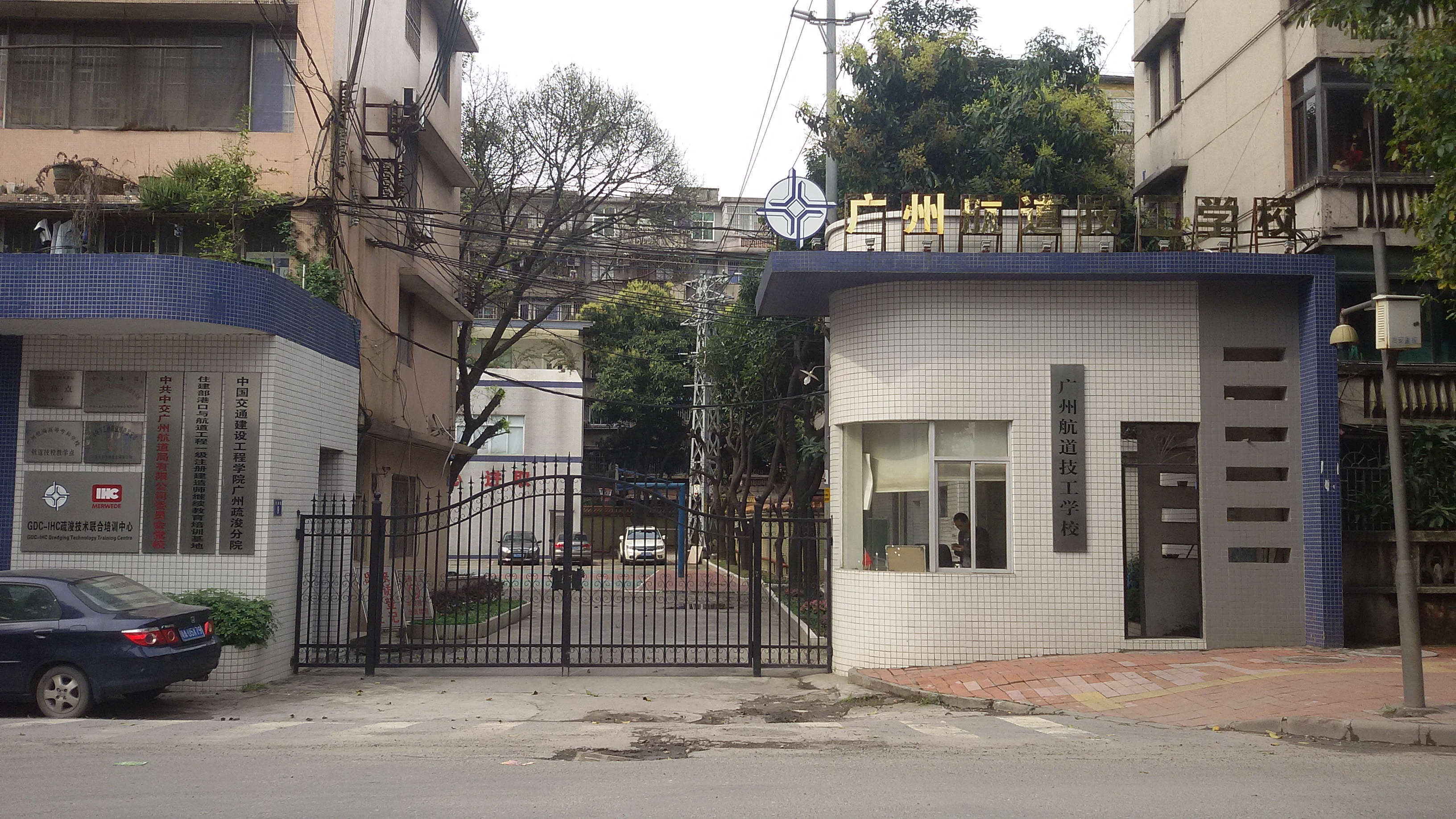 粵語: 廣州航道技工學校